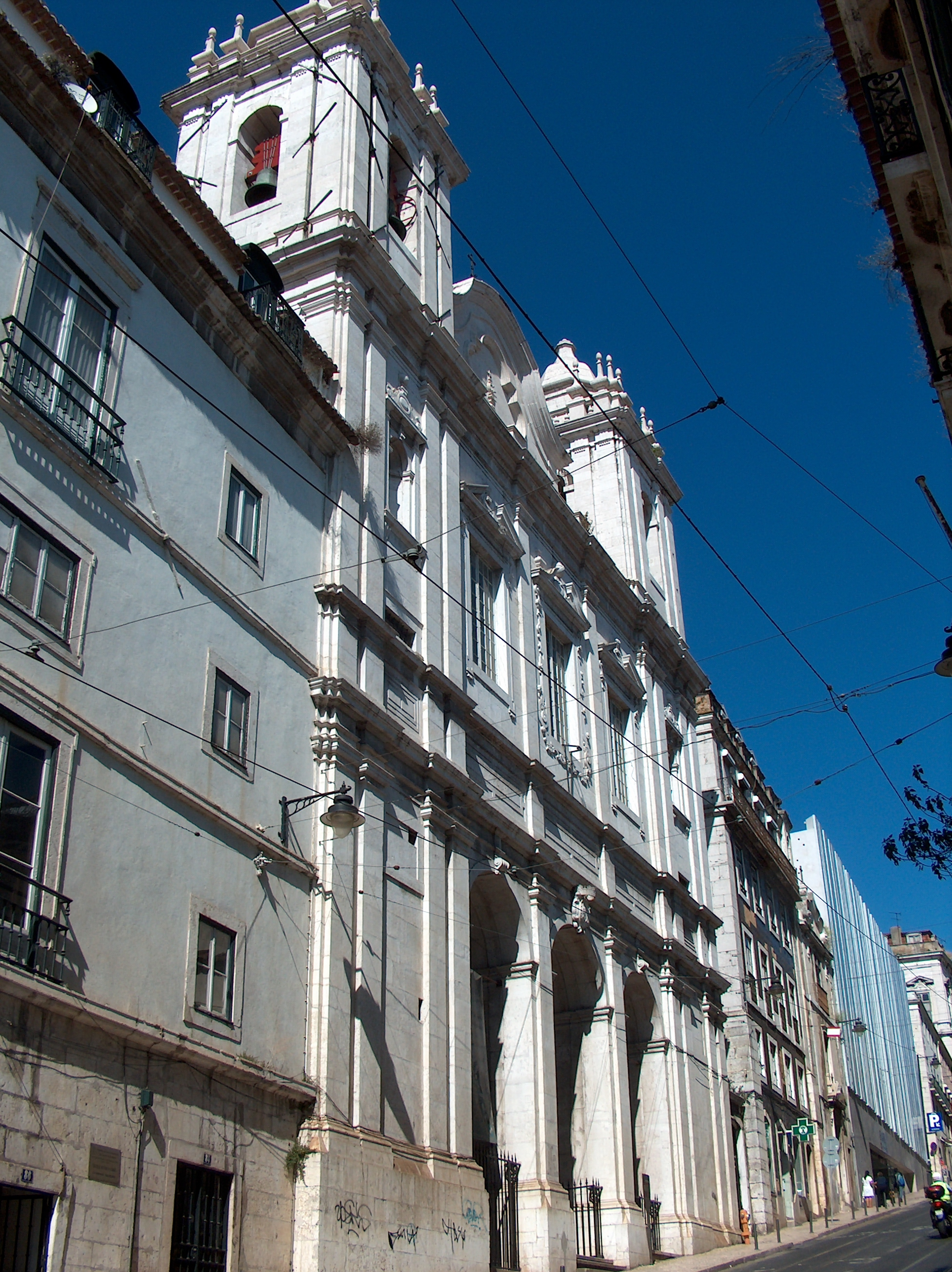 Igreja de Santa Catarina, Igreja dos Paulistas ou Igreja de São Paulo da Serra de Ossa